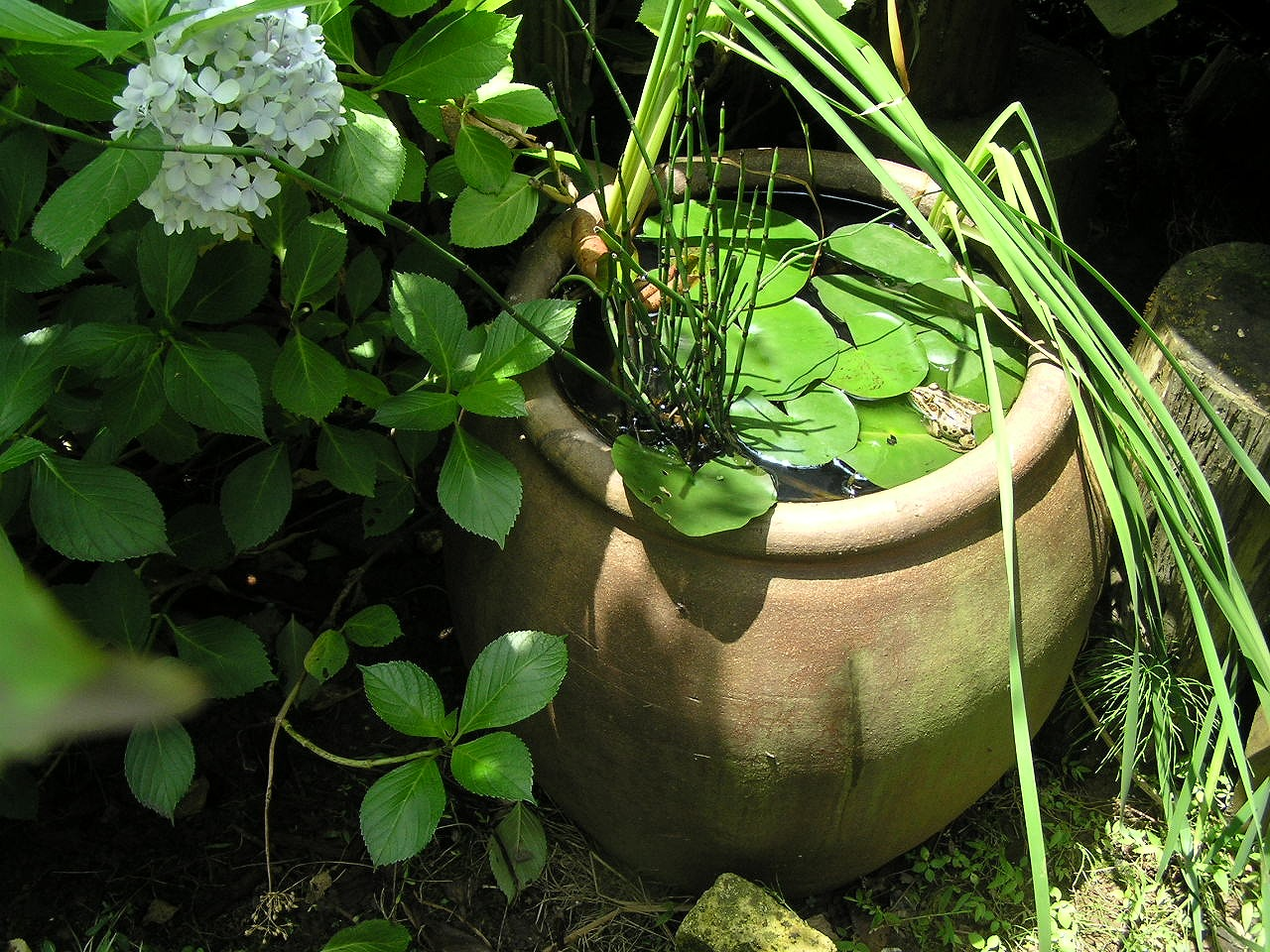 瓶を縄張りにしたトノサマガエル①